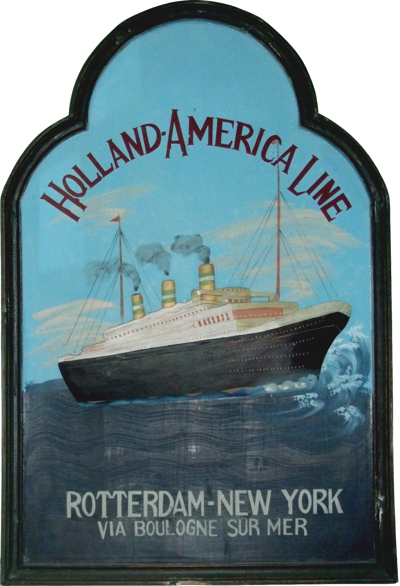 Historisches Gemälde der Holland-America Line